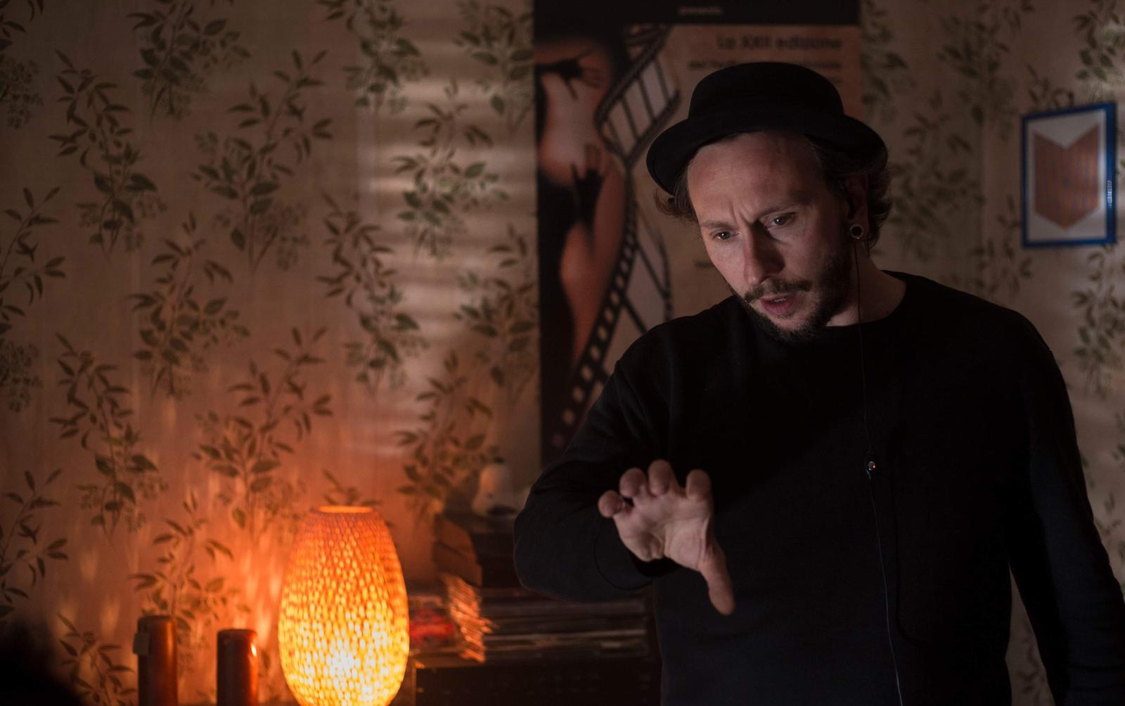 Tuttapposto (2019)